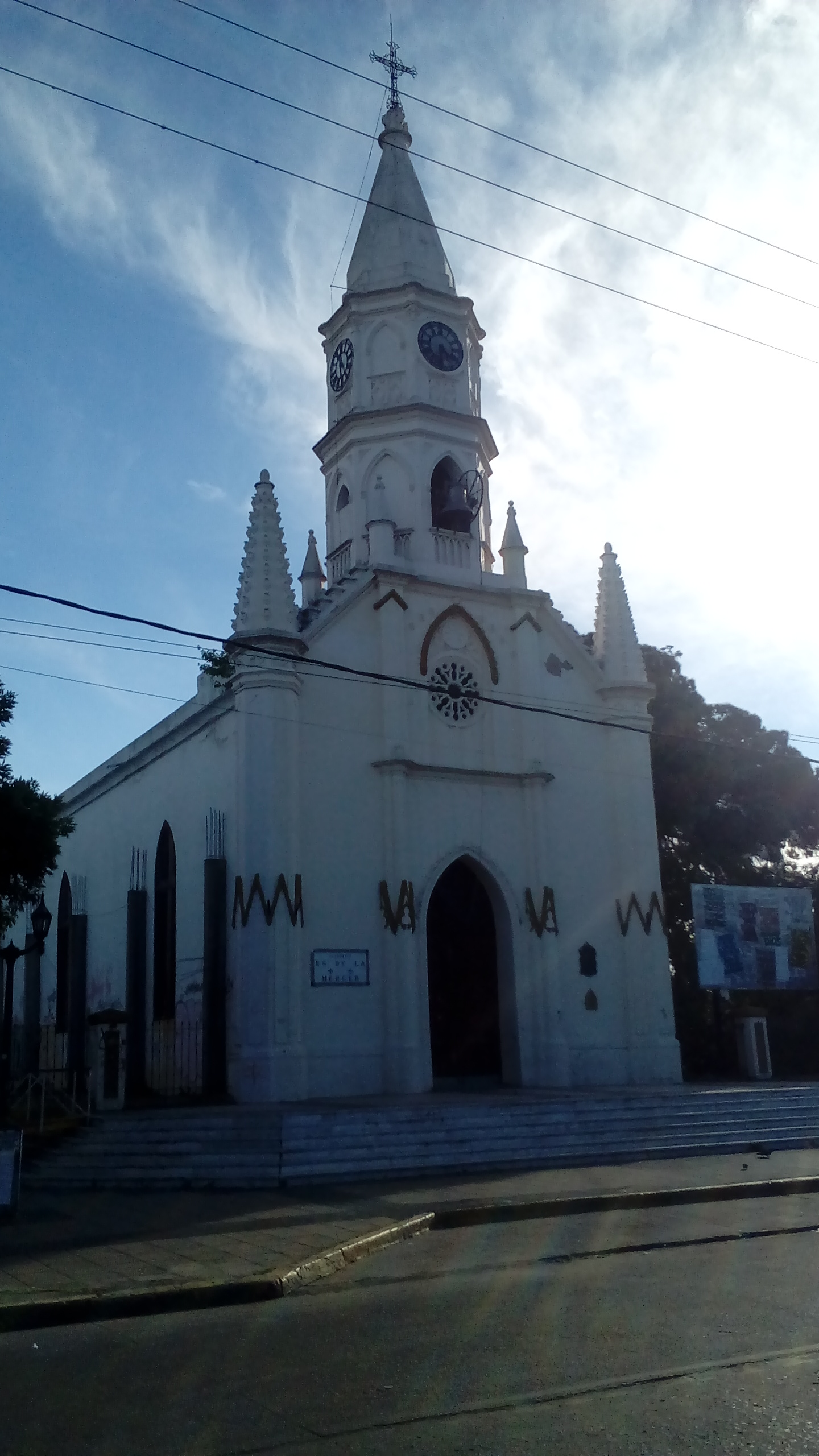 Iglesia Nuestra Señora de la Merced. En el casco historico de la ciudad. Diseñada por Pedro Beinot, construida en 1864.